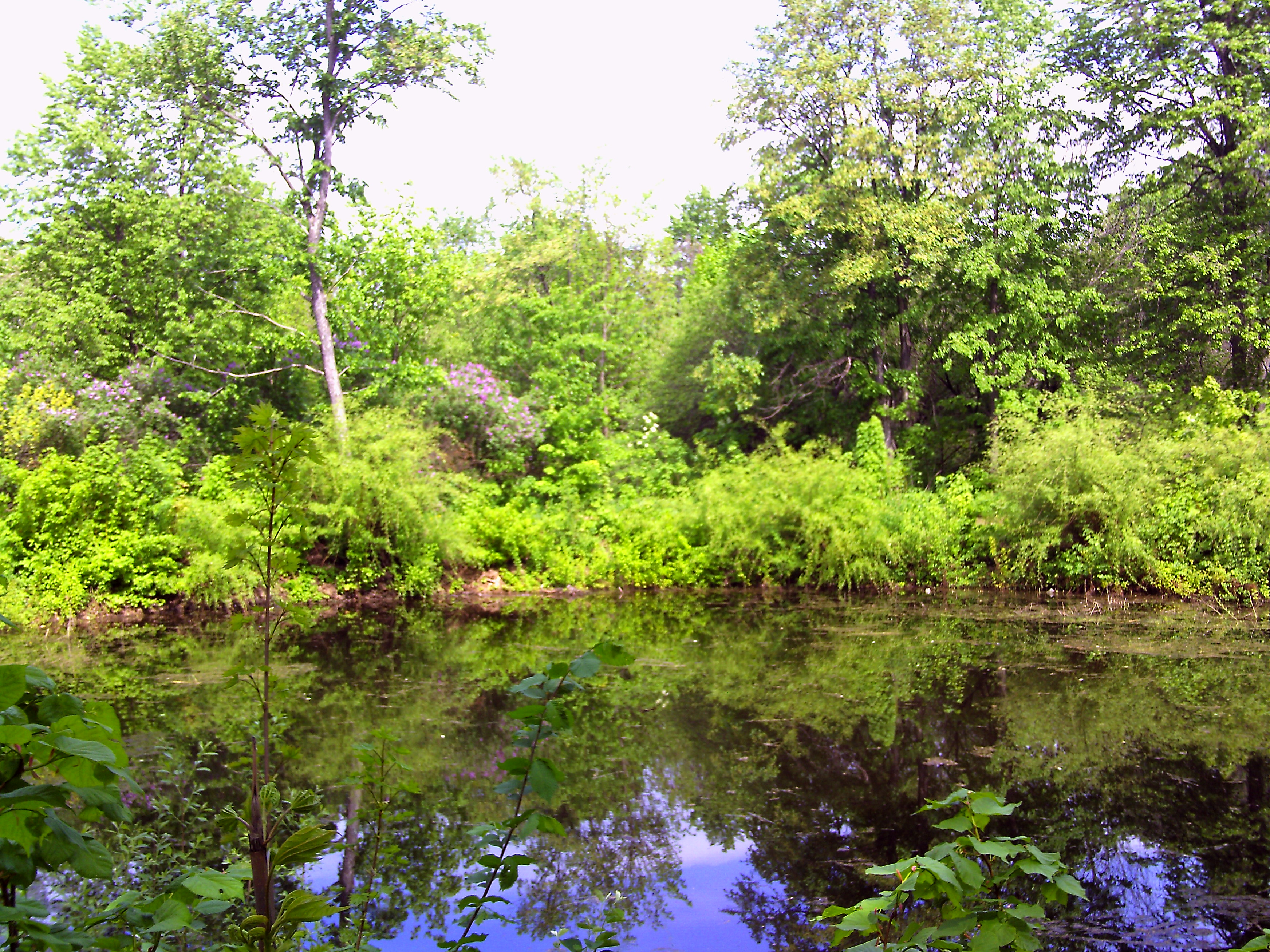 Весна в парке с. Гагарино Тамбовской области